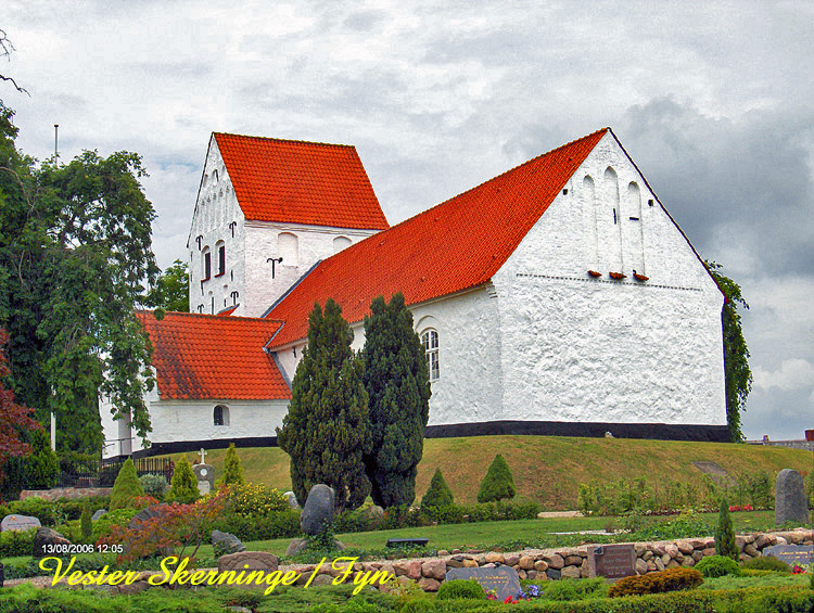 fra sydøst